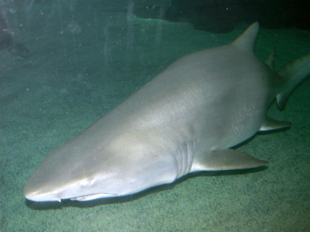 Vasca degli squali dell'Acquario di Genova, Liguria, ItaliaGenova